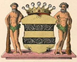 Rossilloni suguvõsa parunivapp